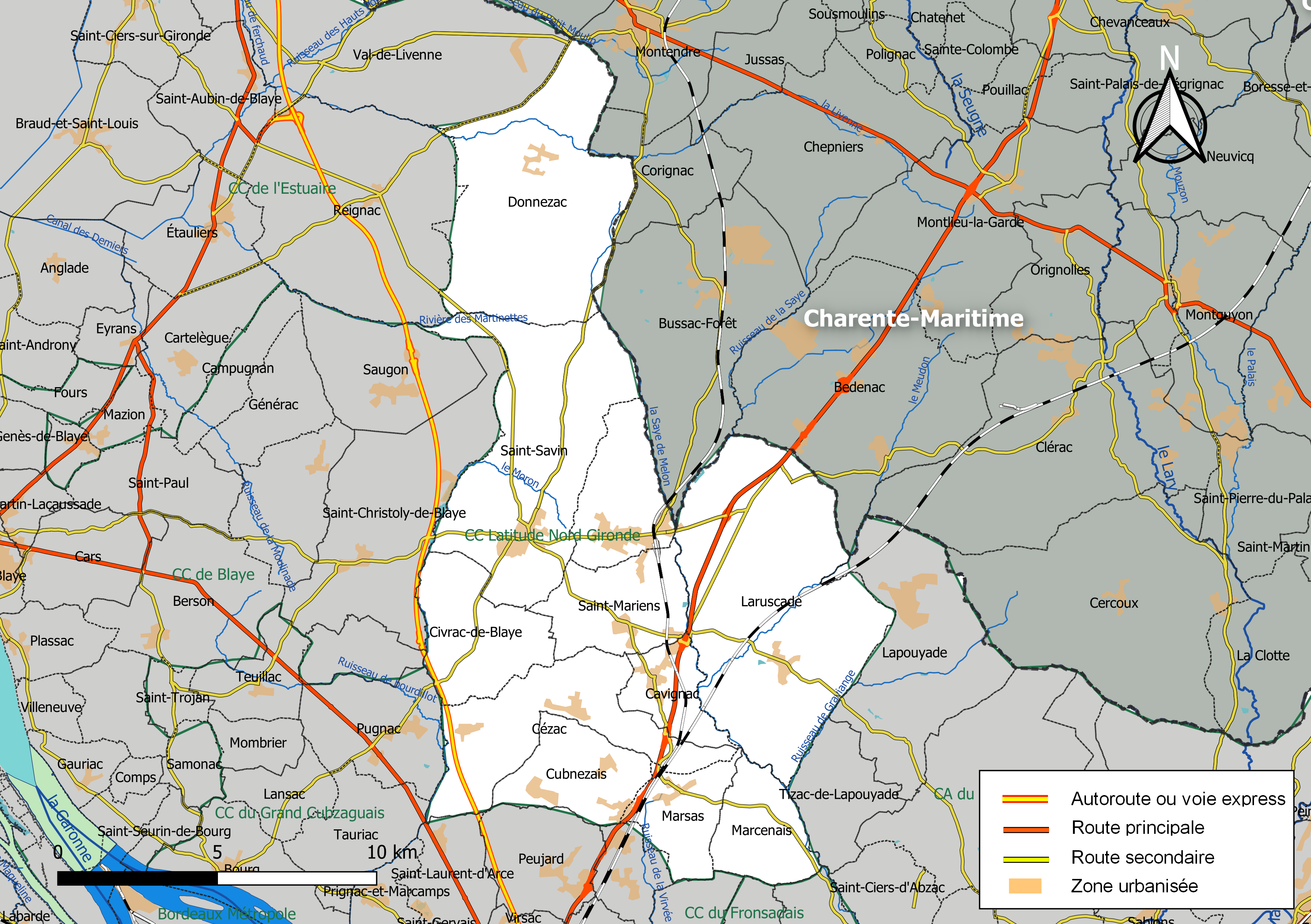 Carte géographique de la Communauté de communes Latitude Nord Gironde, département de la Gironde, France. Composition au 1er janvier 2019.